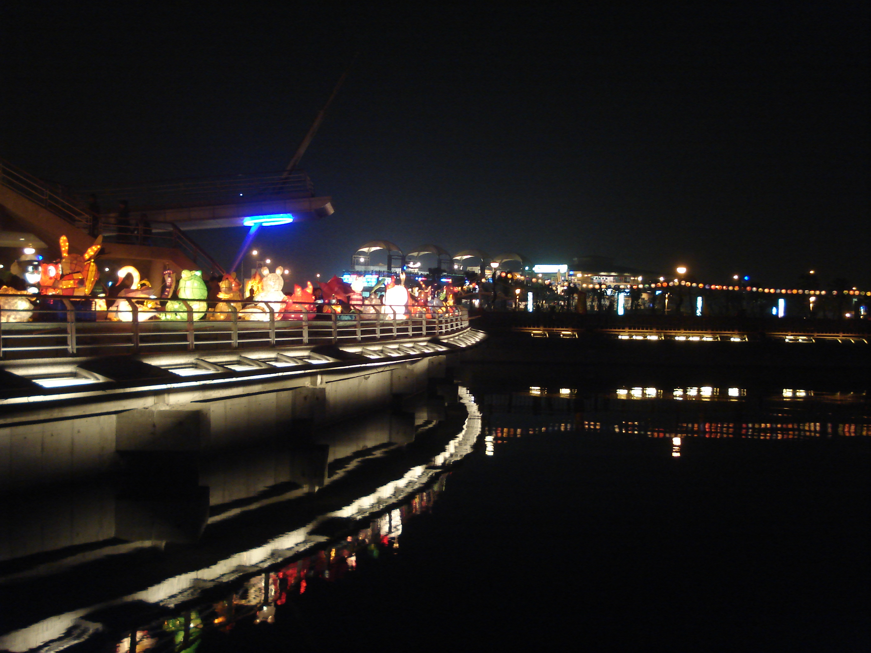 2008年元宵情人碼頭